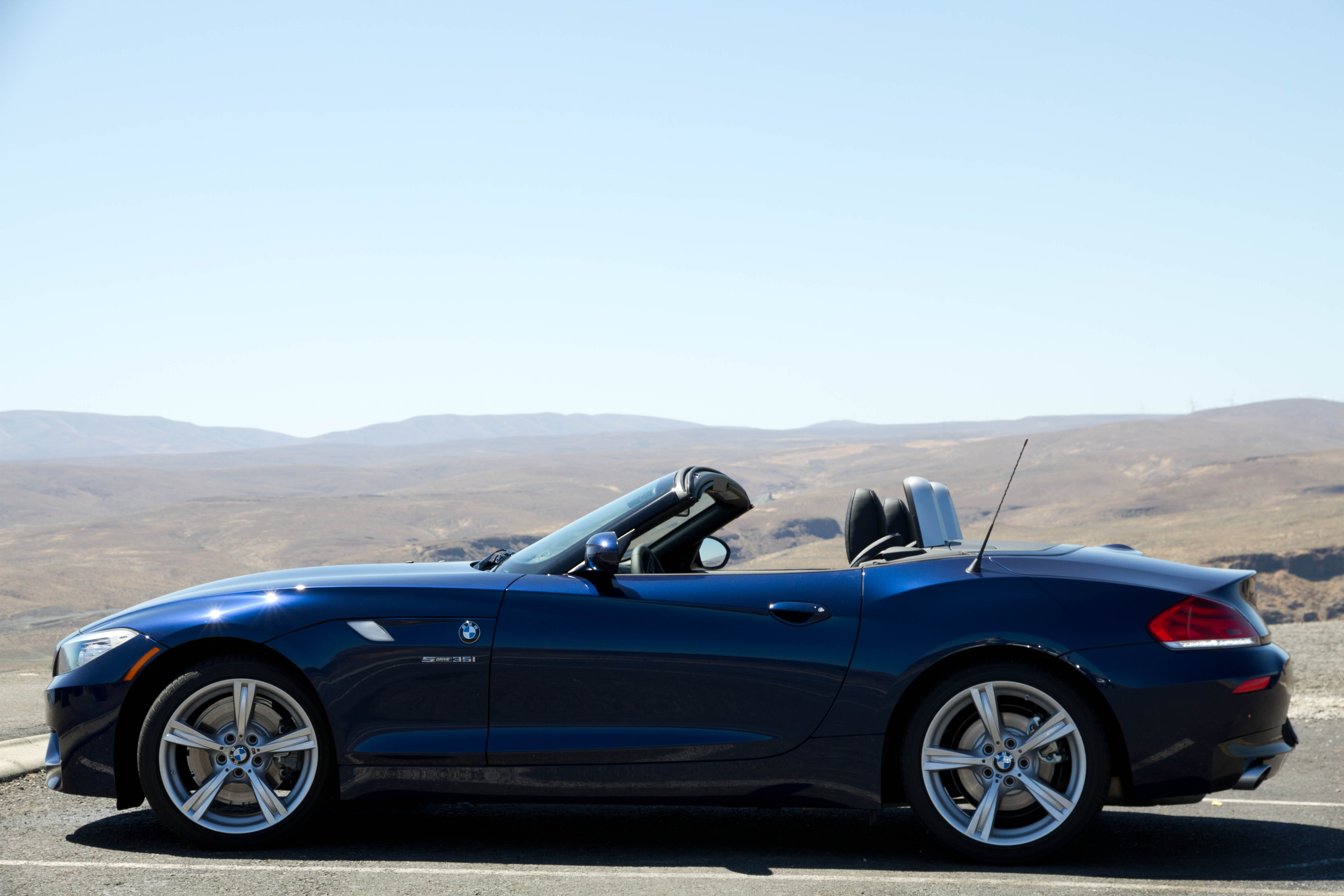 2011 BMW Z4 sDrive35i